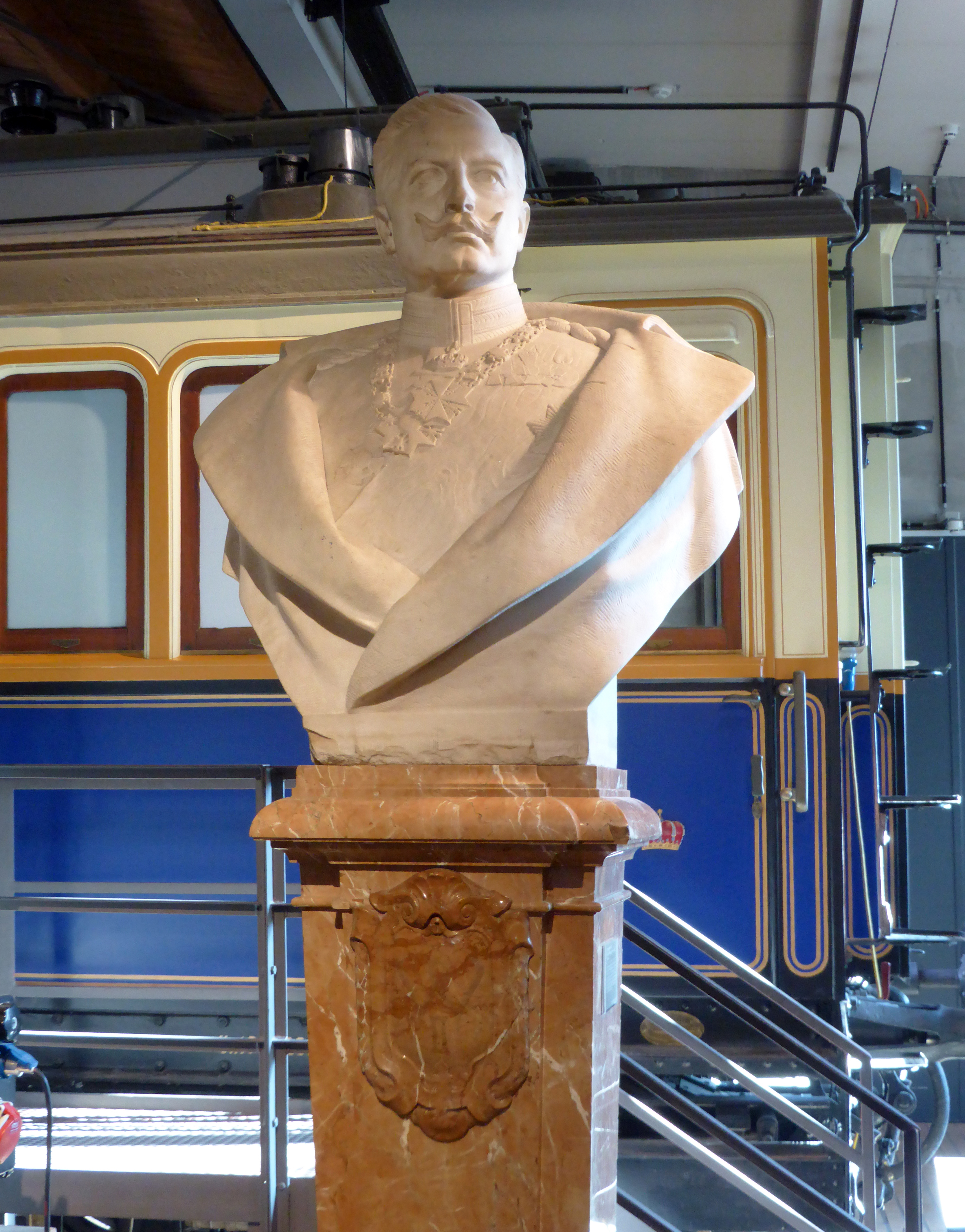 Marmorbüste Wilhelm II. vom Bildhauer Ludwig Manzel von 1906 vor dem Hofzug Kaiser Wilhelms II., Baujahr 1888. Breslauer Aktiengesellschaft für Eisenbahnwagenbau. Ausgestellt im Deutschen Technikmuseum in Berlin. Inventarnummer: VBM E-B-5009. Wikipedianische KulTour am 10. Oktober 2015 in der Ausstellung des Museums.